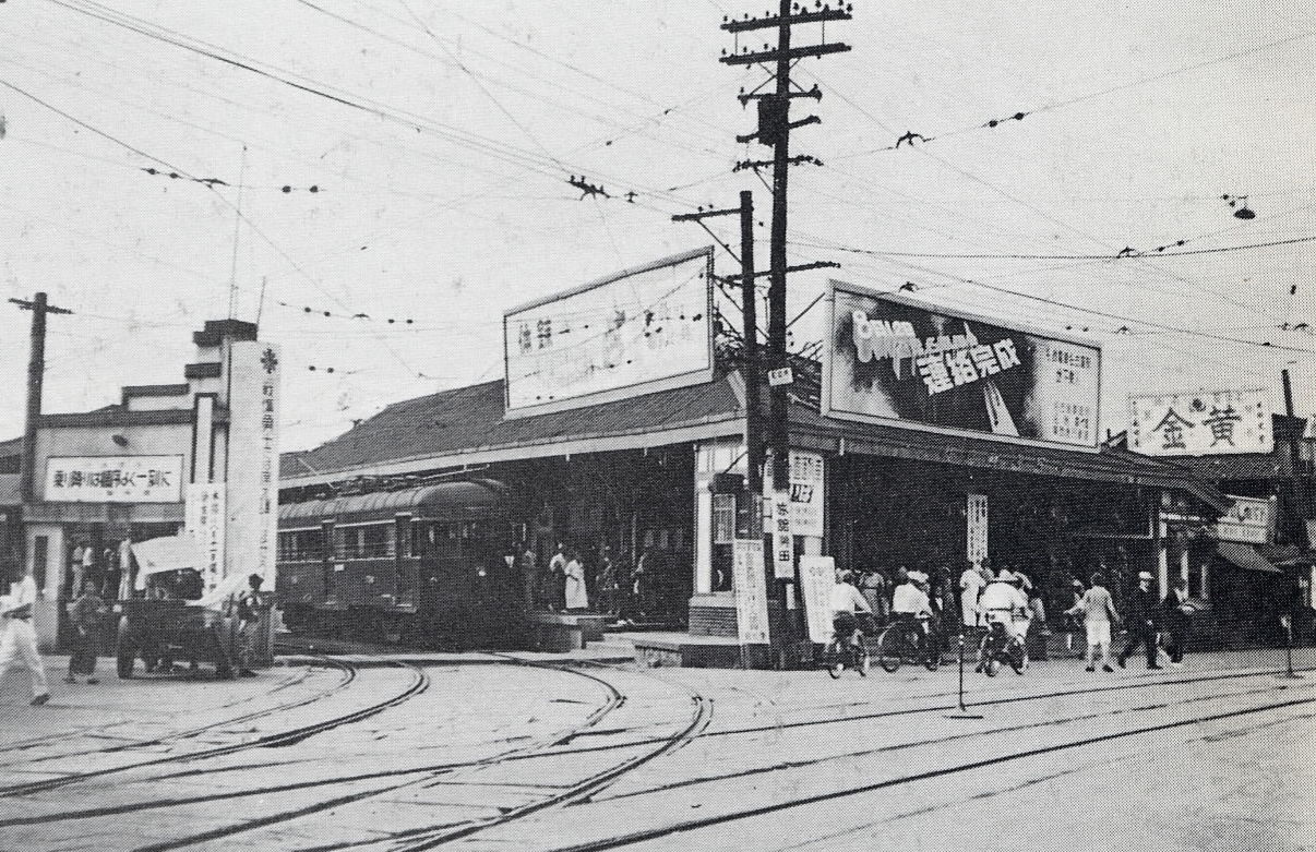 名鉄押切駅より市電線路を使って柳橋駅へ向かう